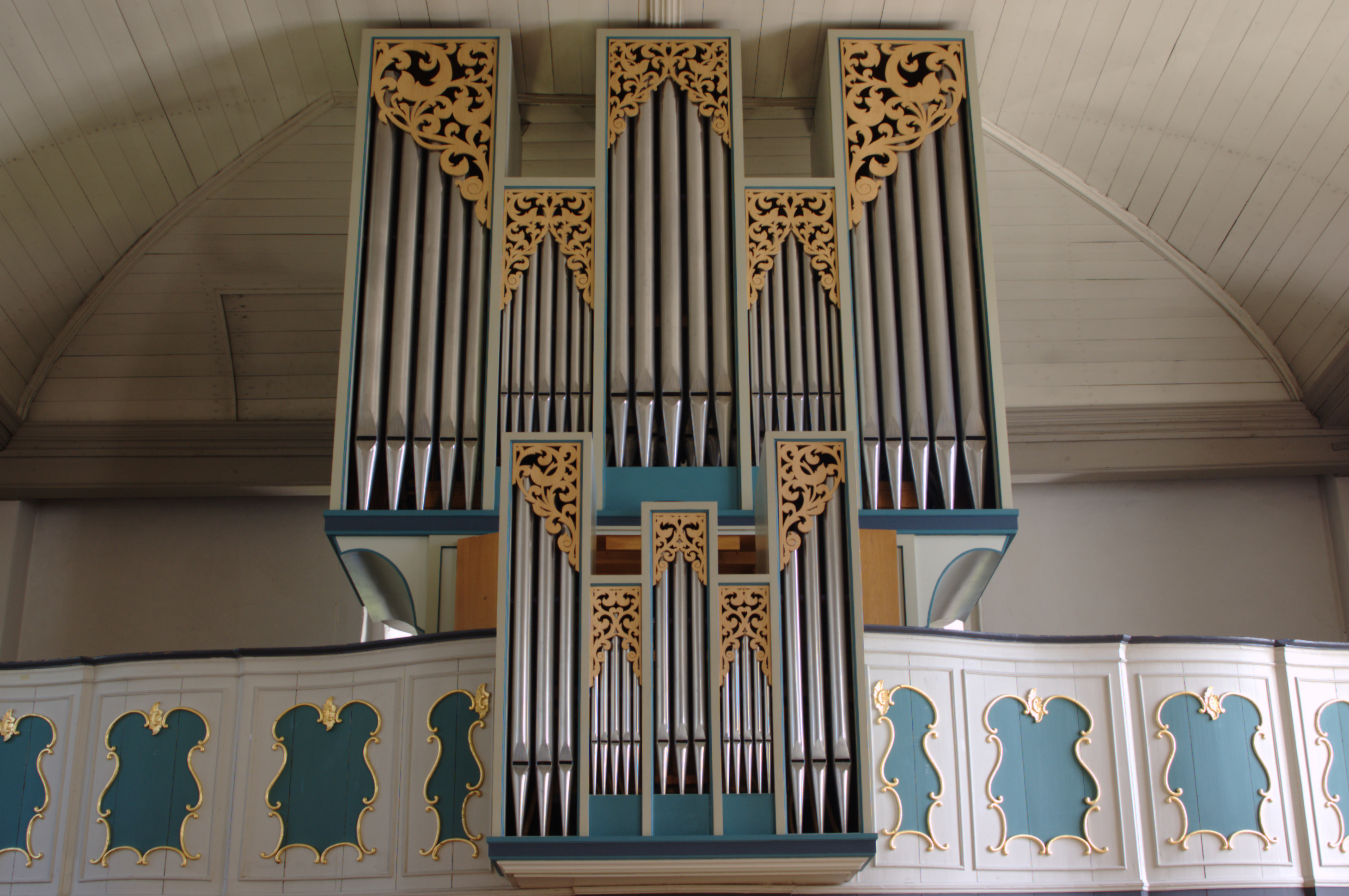 Orgel in Ihrhove Reformierte Kirche